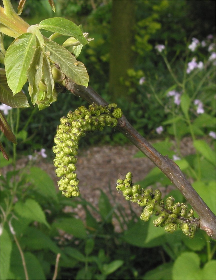 Walnoot Juglans regia mannelijke bloemen (male flowers)